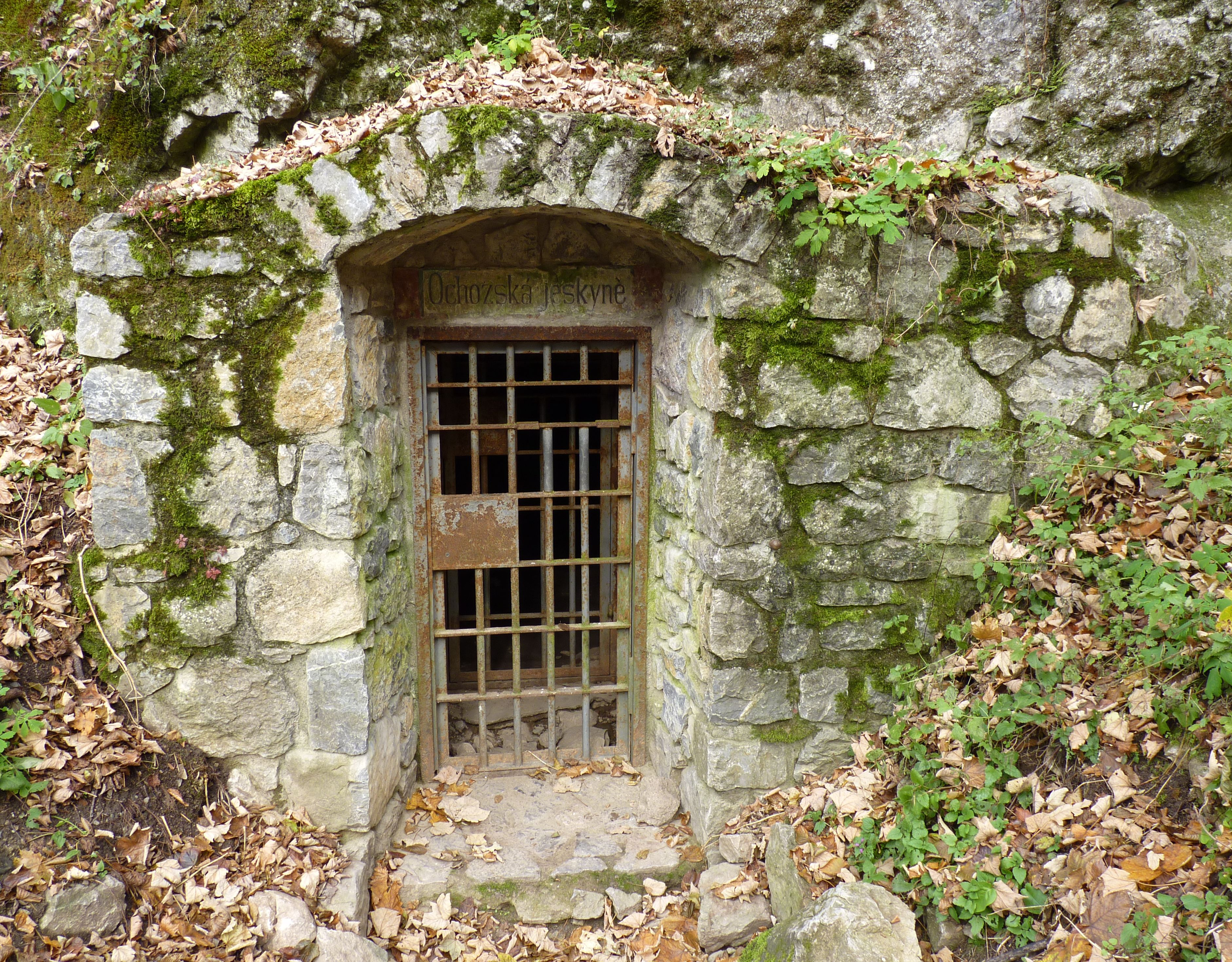 Ochozská jeskyně (Moravský kras)